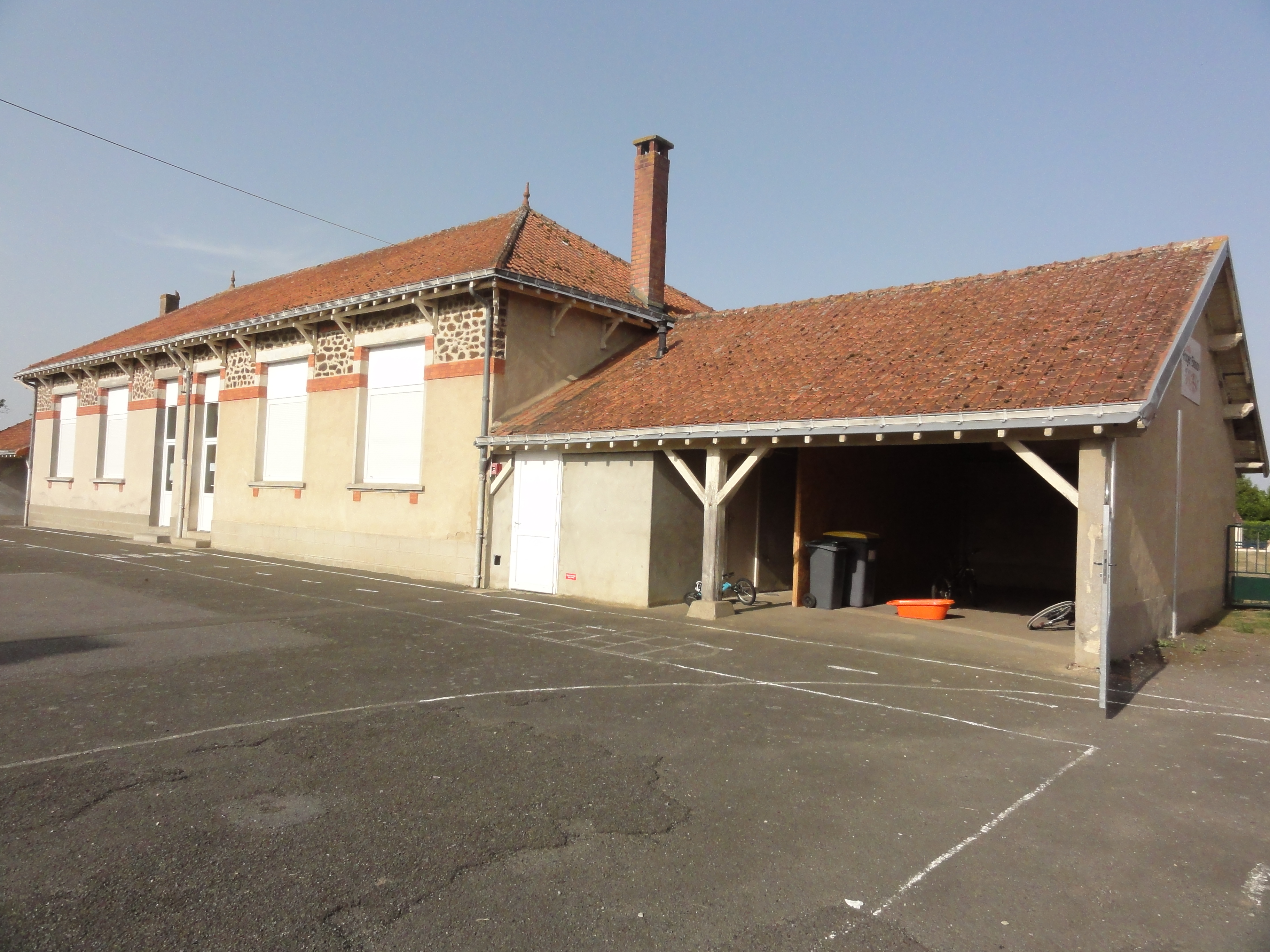 Teillé (Sarthe) école Roger Buisson